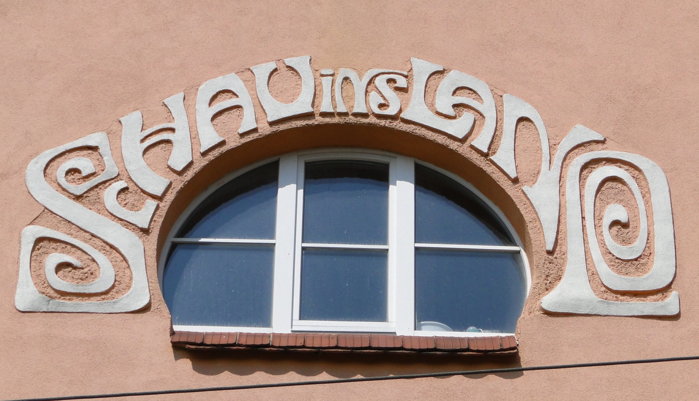 Villa Schau ins Land im Dresdner Stadtteil Loschwitz, Fassadendetail